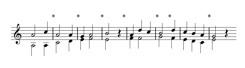 Description : Mouvement contraire Source : Personnelle Licence : GFDL